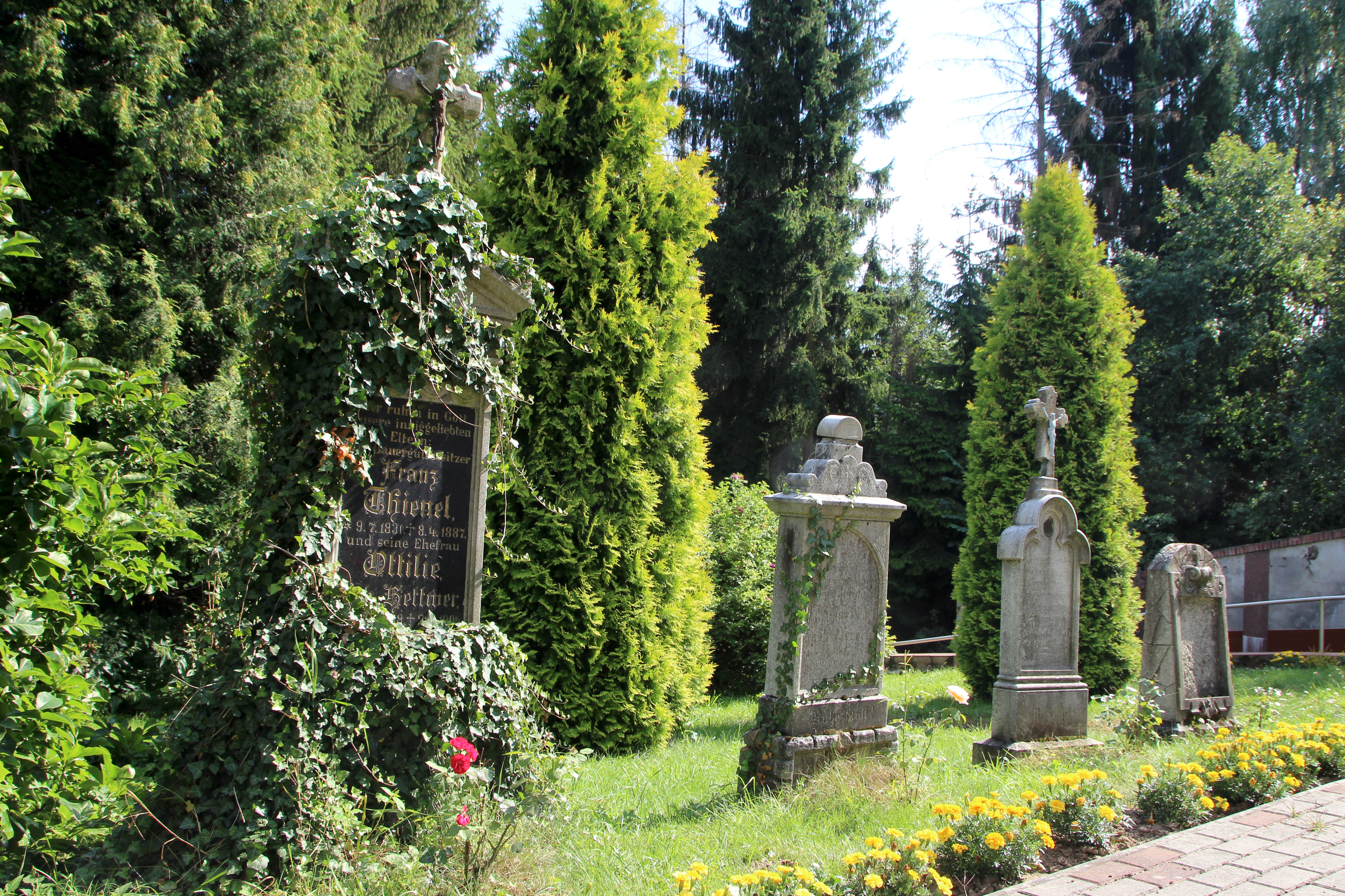 Rudziczka – wieś w Polsce położona w województwie opolskim, w powiecie prudnickim, w gminie Prudnik.